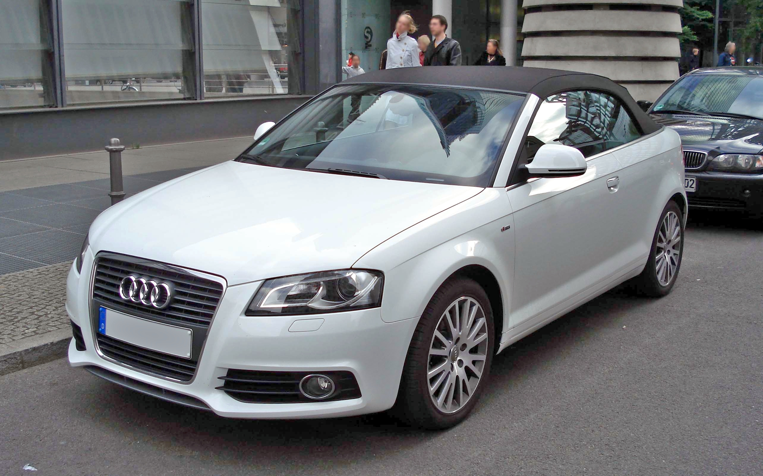 Audi A3 Cabriolet (8P)